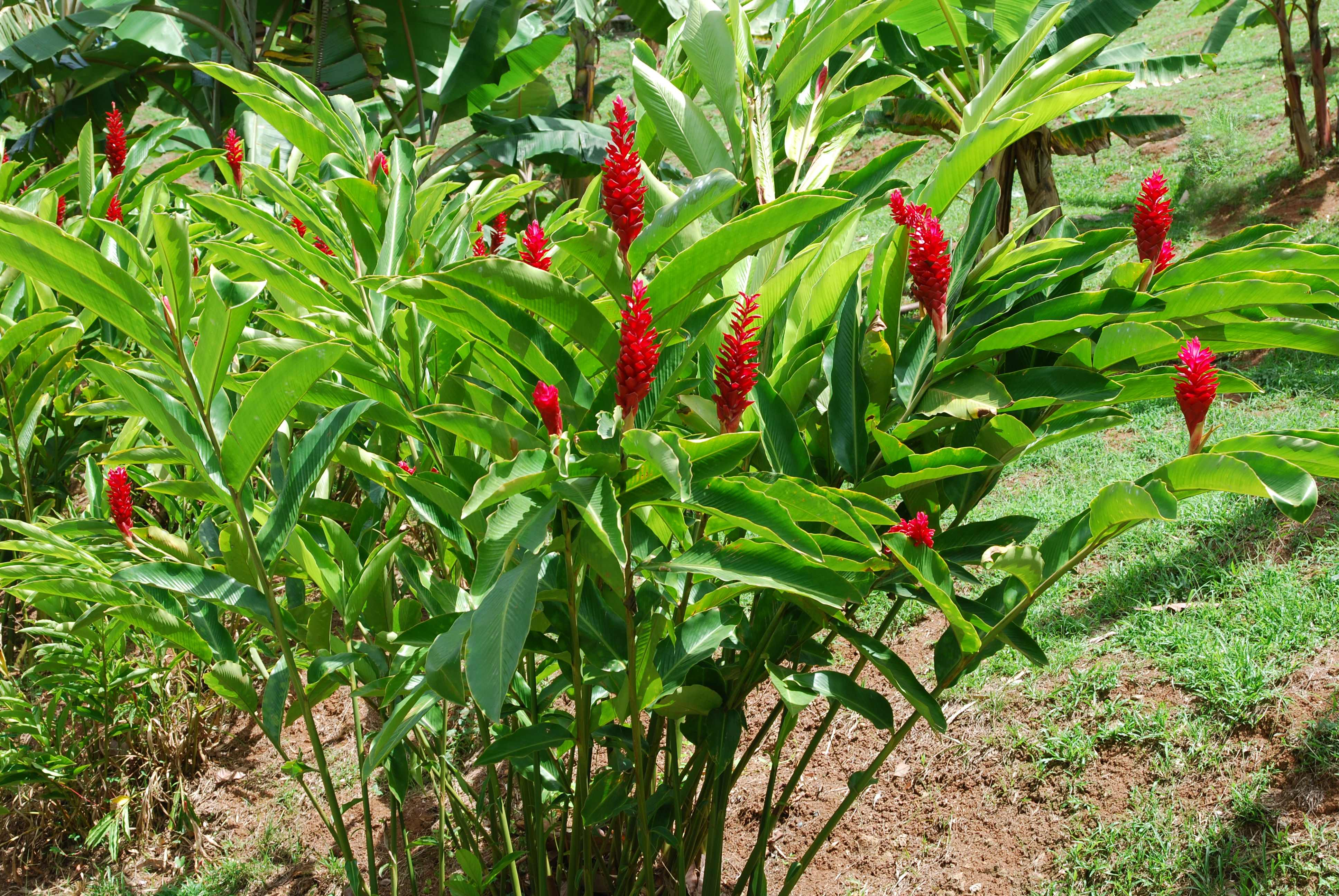 Alpinia purpurata, touffe, Martinique